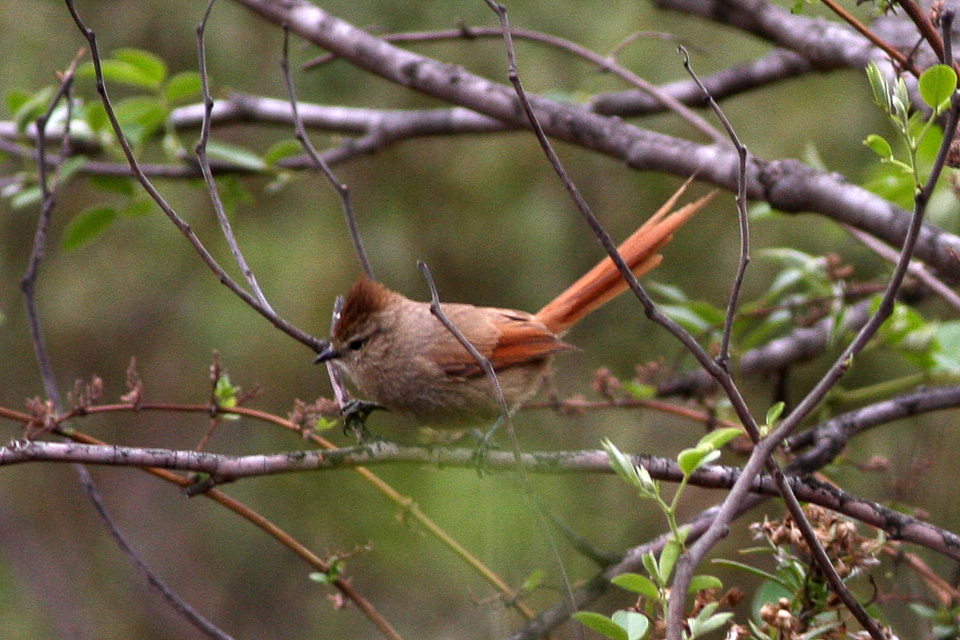 Yavi to St Victoria to Yavi